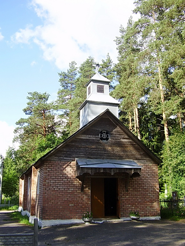 Акцябр. Капліца Святога Дамініка